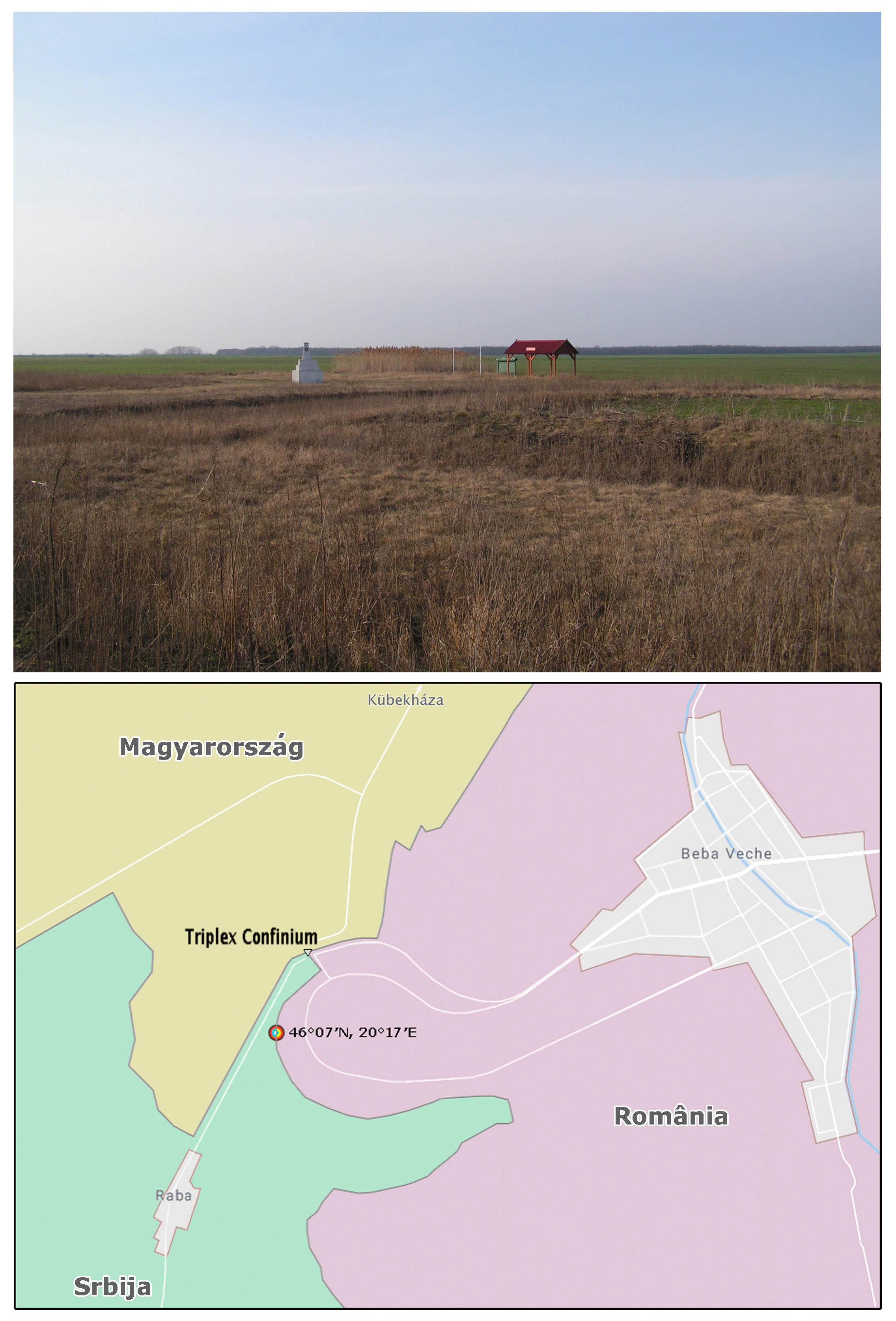 Vedere către NW (Ungaria). Se observă monumentul Triplex Confinium şi vechea fâşie de delimitare.